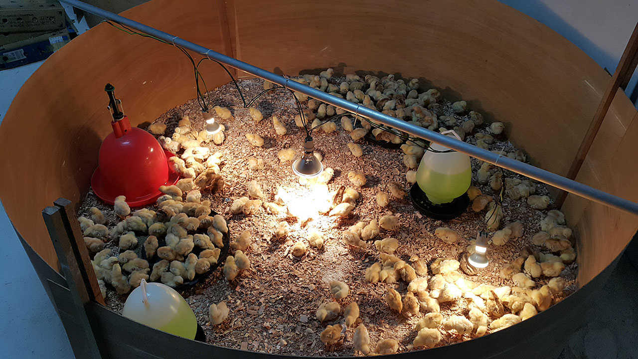 Anak ayam kampung dalam gelung